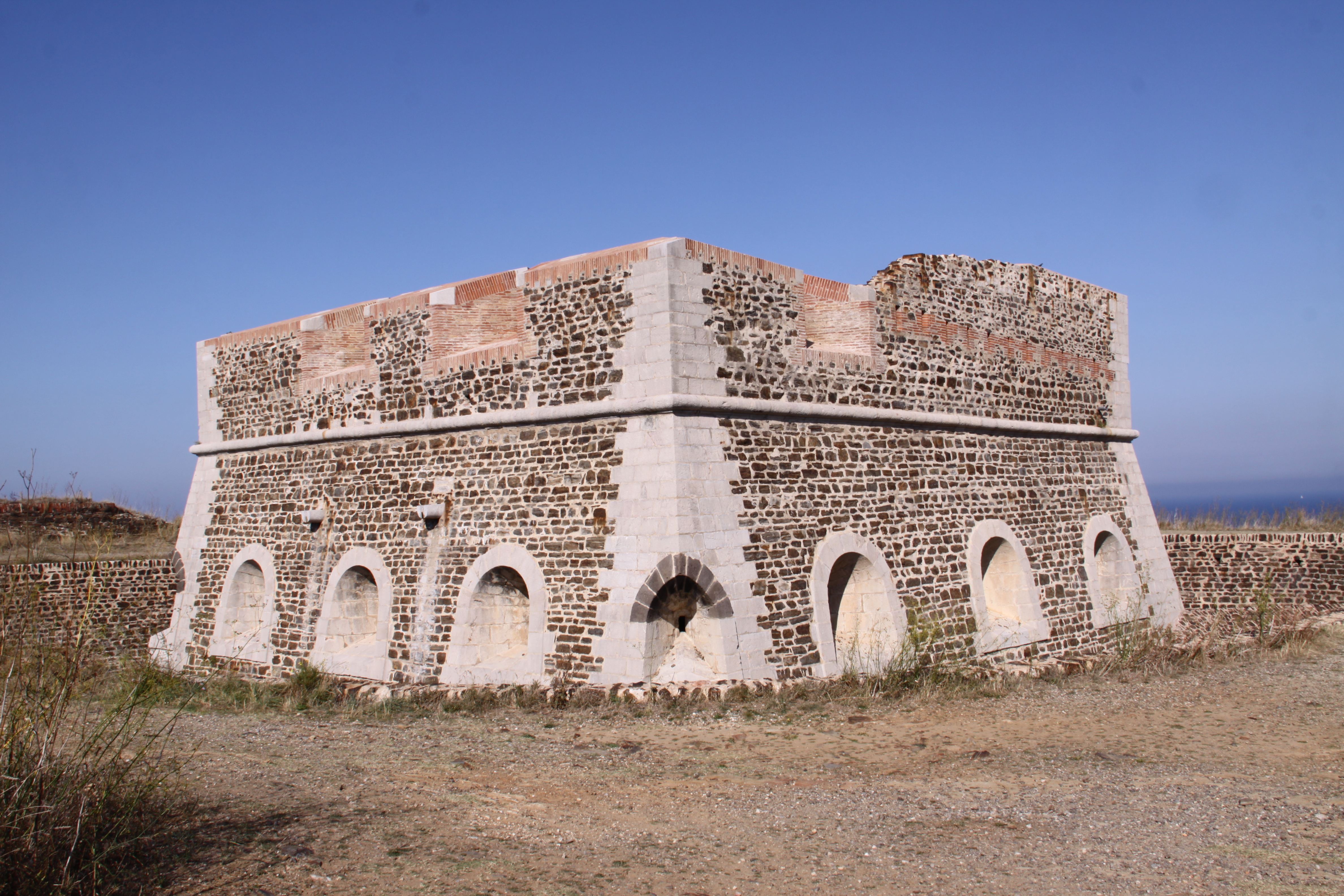 Le Fort Carré de Collioure (1ère moitié du 18ème siècle) est un édifice militaire. Le Fort Carré fait partie de l' ensemble "Fort Carré, Tour de l' Etoile et caponnière" qui ne forme qu'un seul MH. Monument Historique classé en 1991. PA00104002. Collioure, Pyrénées-Orientales, France